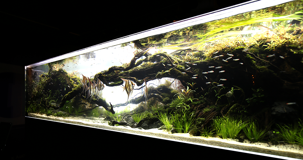 한국 최초 K-옥션 출품작